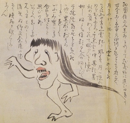 Yuki-baba (雪婆, a snow hag) from the Bakemono-Emaki (ばけもの絵巻)